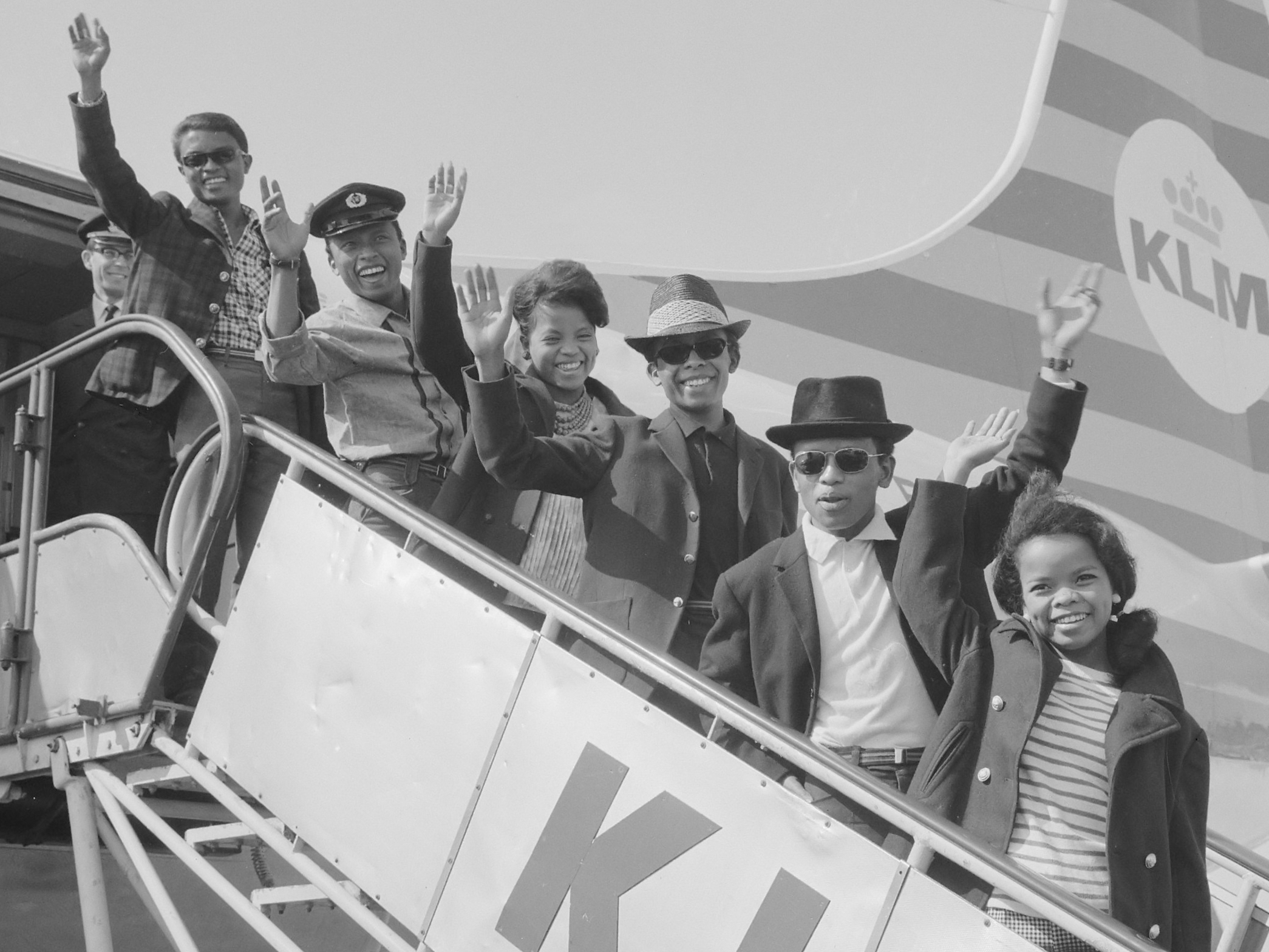 Aankomst Franse zanggroep "Les Surfs" op Schiphol, op de vliegtuigtrap 8 juni 1964